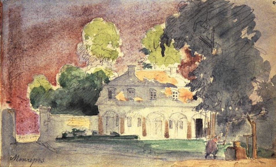 Schloss Monrepos - Aquarell von Eduard von Kallee um 1850